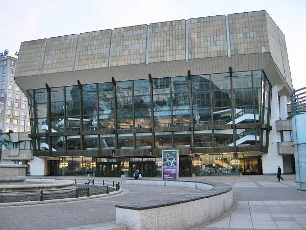 Neues Gewandhaus, Augustusplatz, Leipzig, Germany